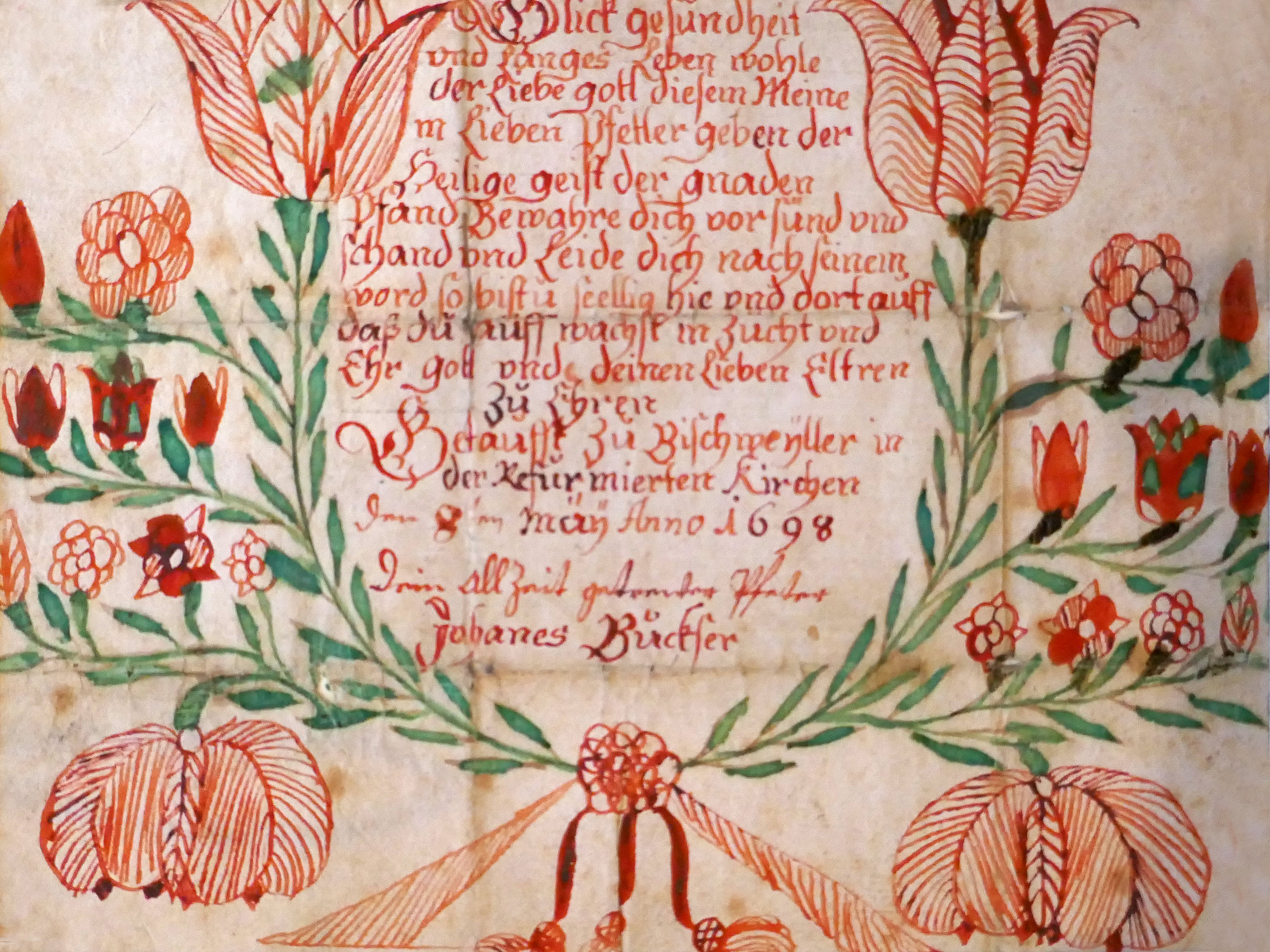 L'une des plus anciennes lettres de baptême (Goettelbriefe) connues : église réformée (calviniste), Bischwiller, 1698. Lettre manuscrite décorée de tulipes et de lis martagons (Lilium martagon). Exposition Vies protestantes : le mot et l'image au Musée alsacien de Strasbourg (2017).